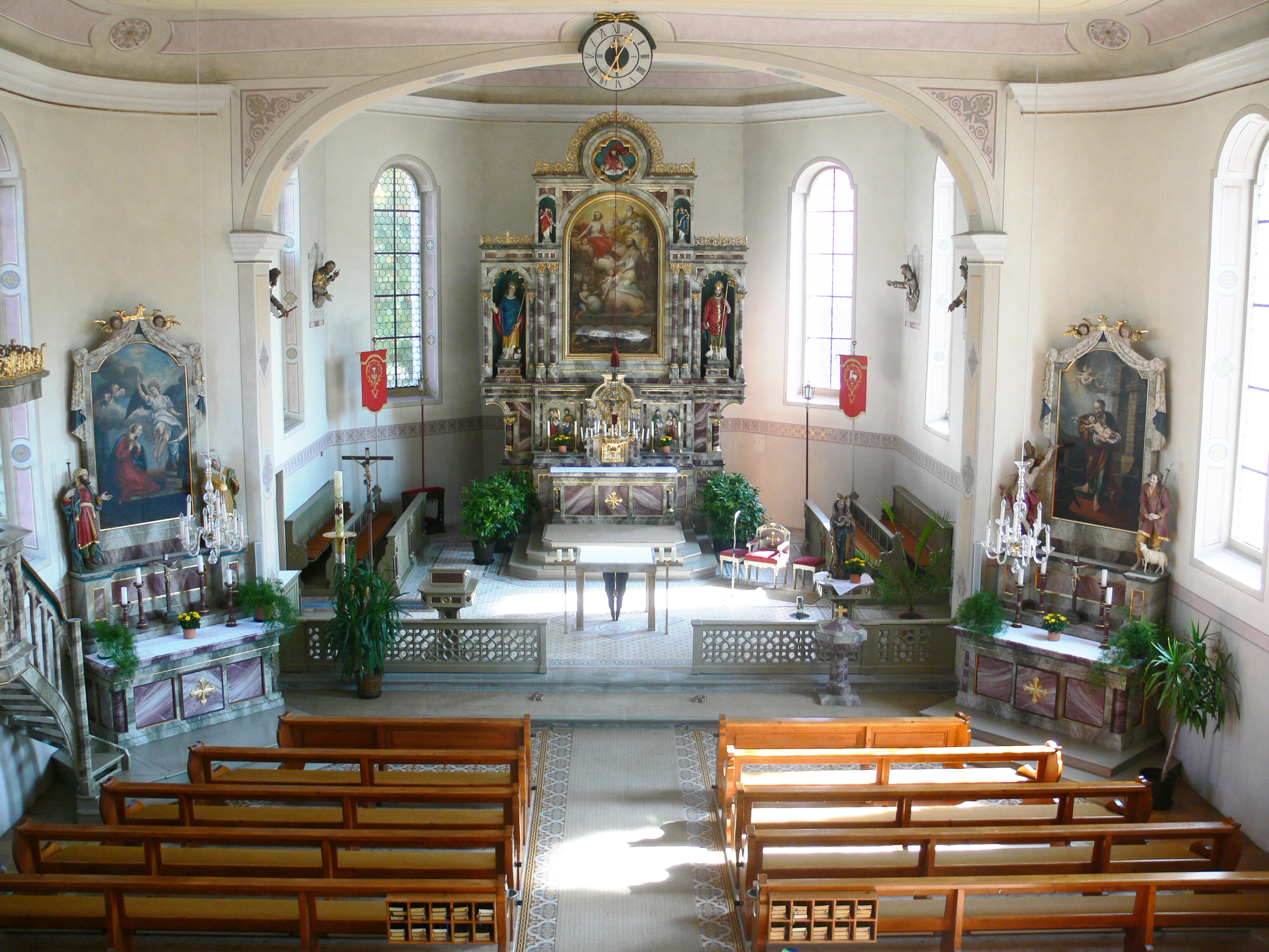 Pfarrkirche St. Gebhard, Maierhöfen (Allgäu). Chor und Altäre.